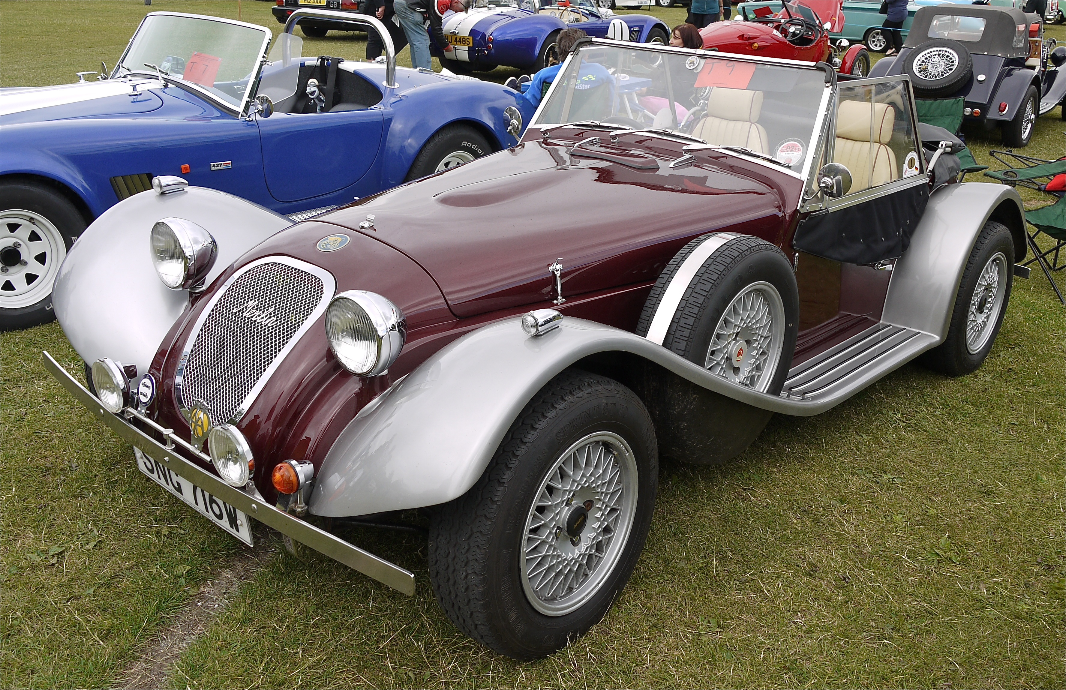 Panasonic G1 14-45 Lens